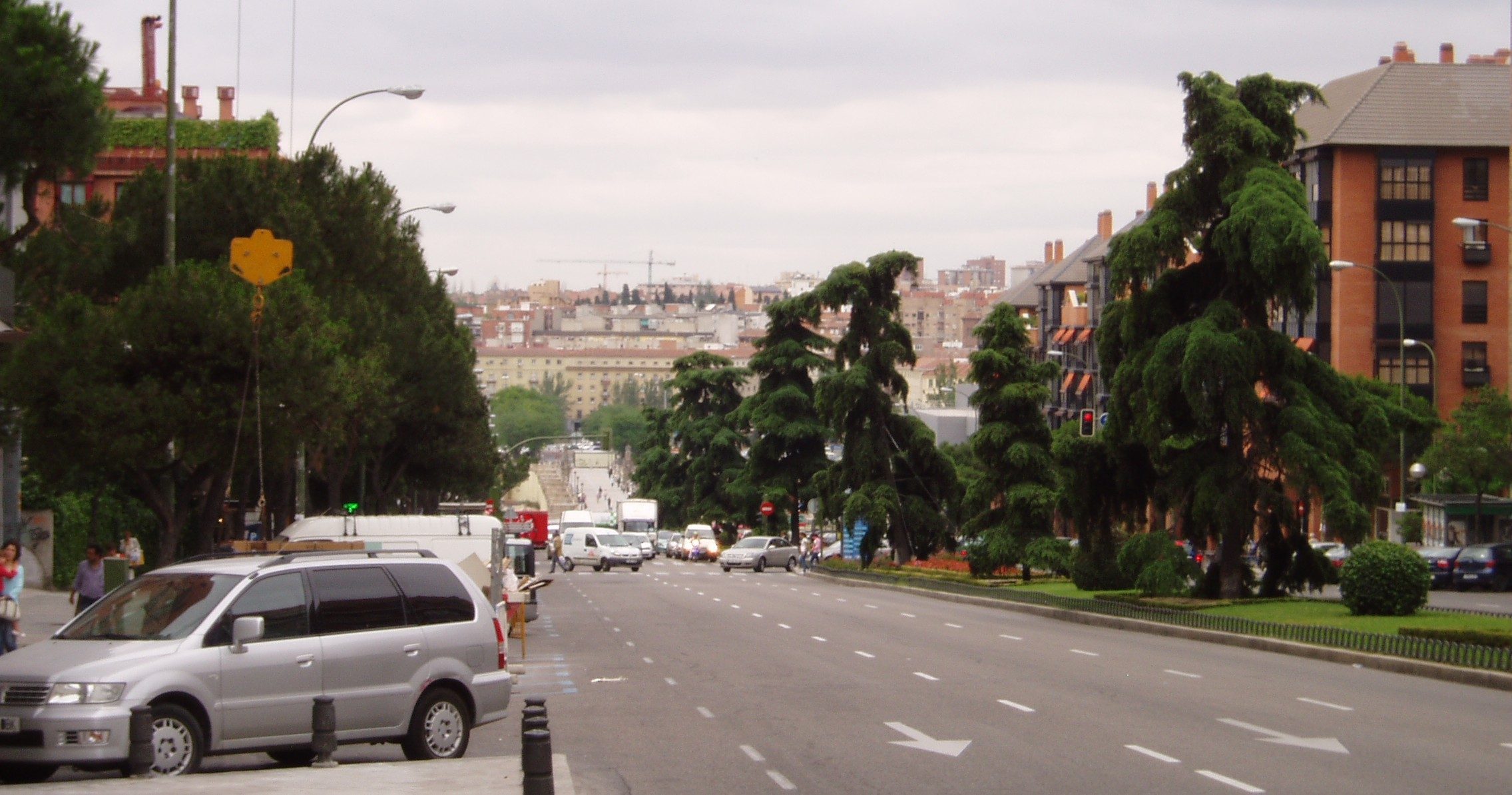 Calle de Toledo (street). Madrid. España / Spain.